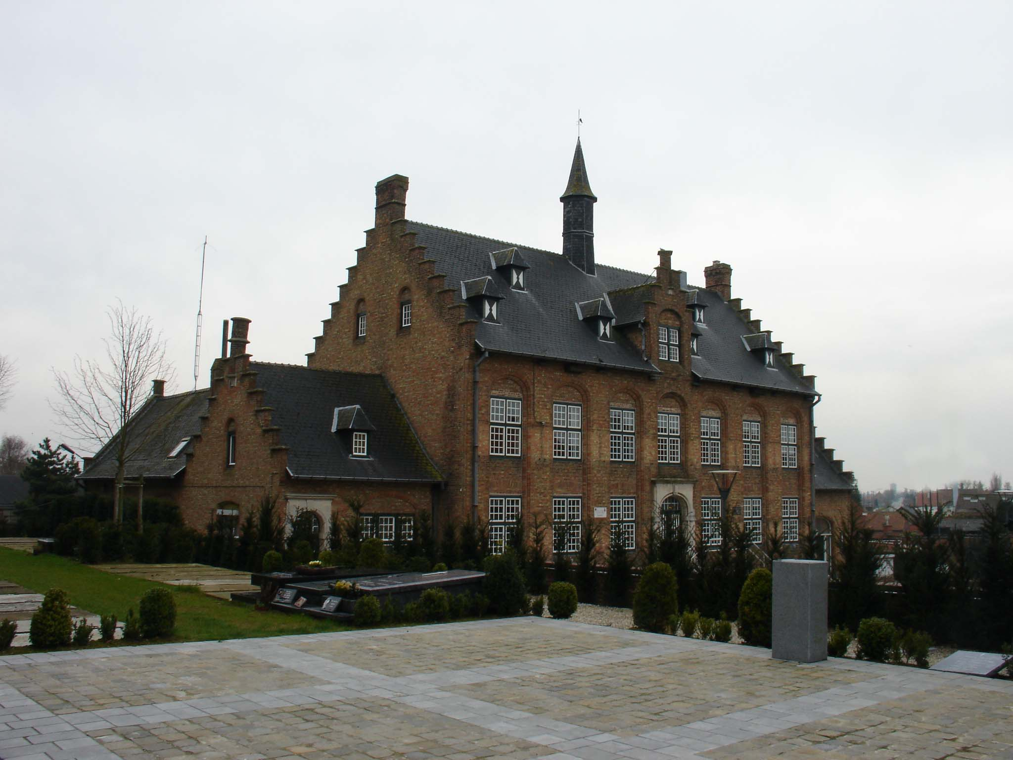 Het oude gemeentehuis op het dorpsplein in Westrozebeke dat nog herinnert aan de tijd dat het dorp nog een aparte gemeente was.